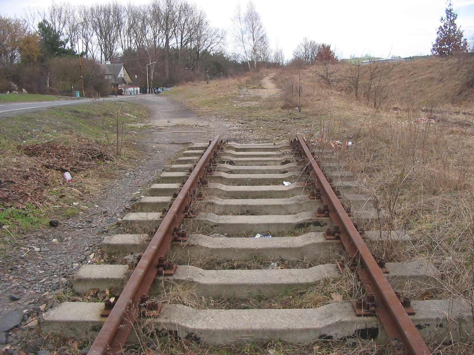 Koniec linii Kolei Szprotawskiej na terenie Zielonej Góry Autor: Mohylek 17:21, 15 March 2007 (UTC)